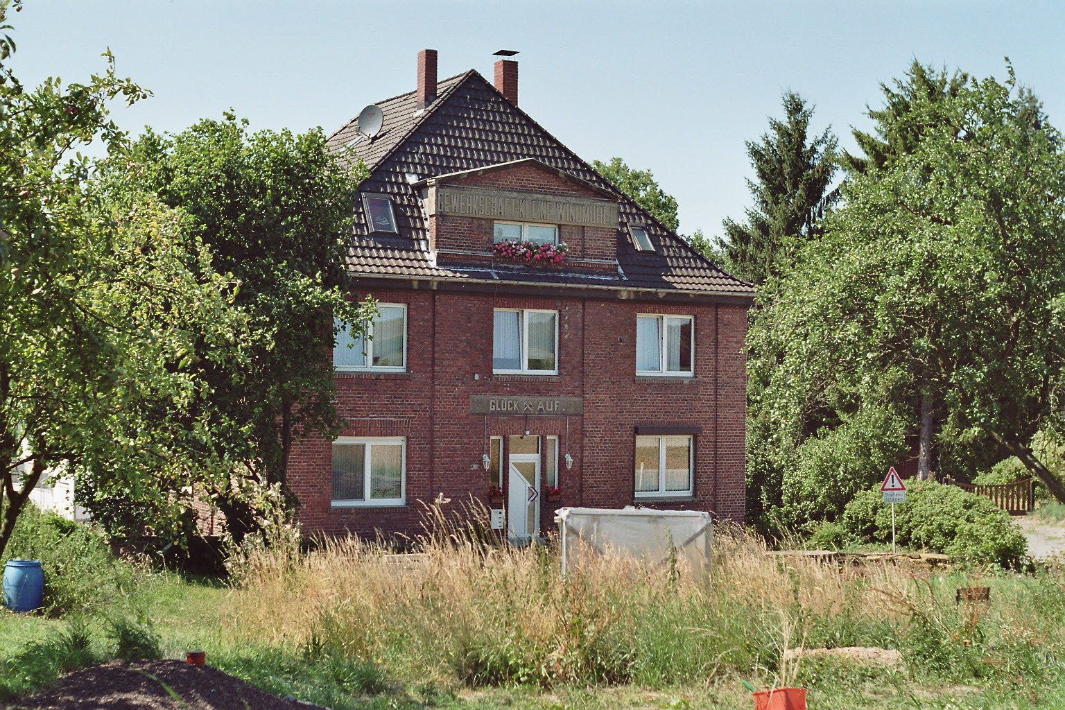 Das Verwaltungsgebäude der Zeche "Kleine Windmühle" in Sprockhövel, Deutschland